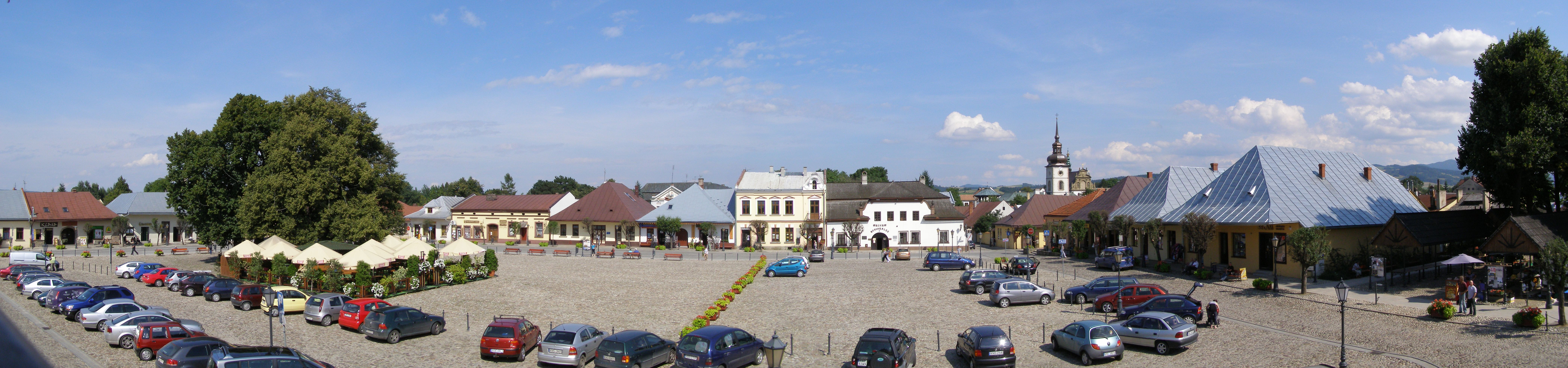 Stary Sącz - Rynek rej. nr 519.